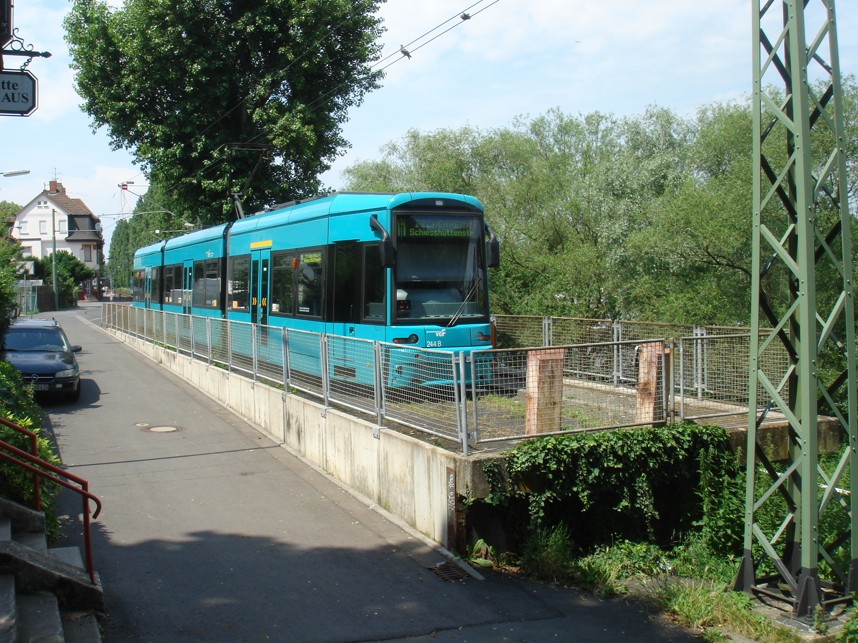 Fechenheim Schiessstrasse, Endstation Frankfurter Straßenbahn